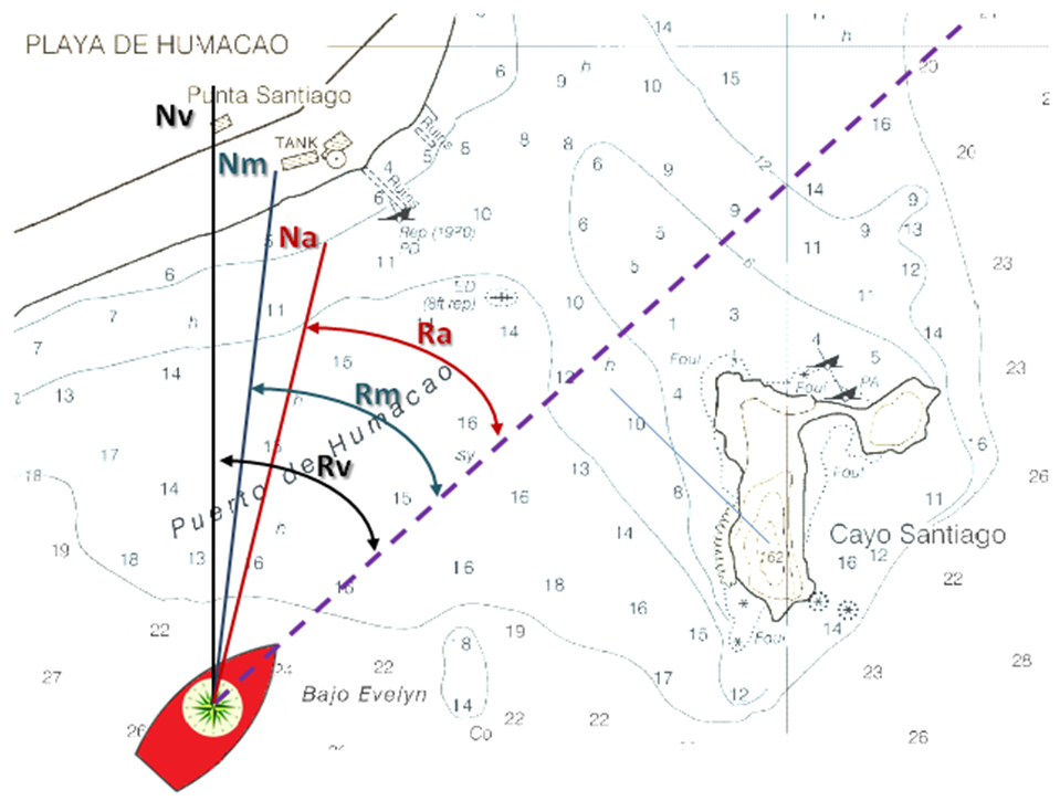 Representación de tiposm de rumbo sobre una carta náutica